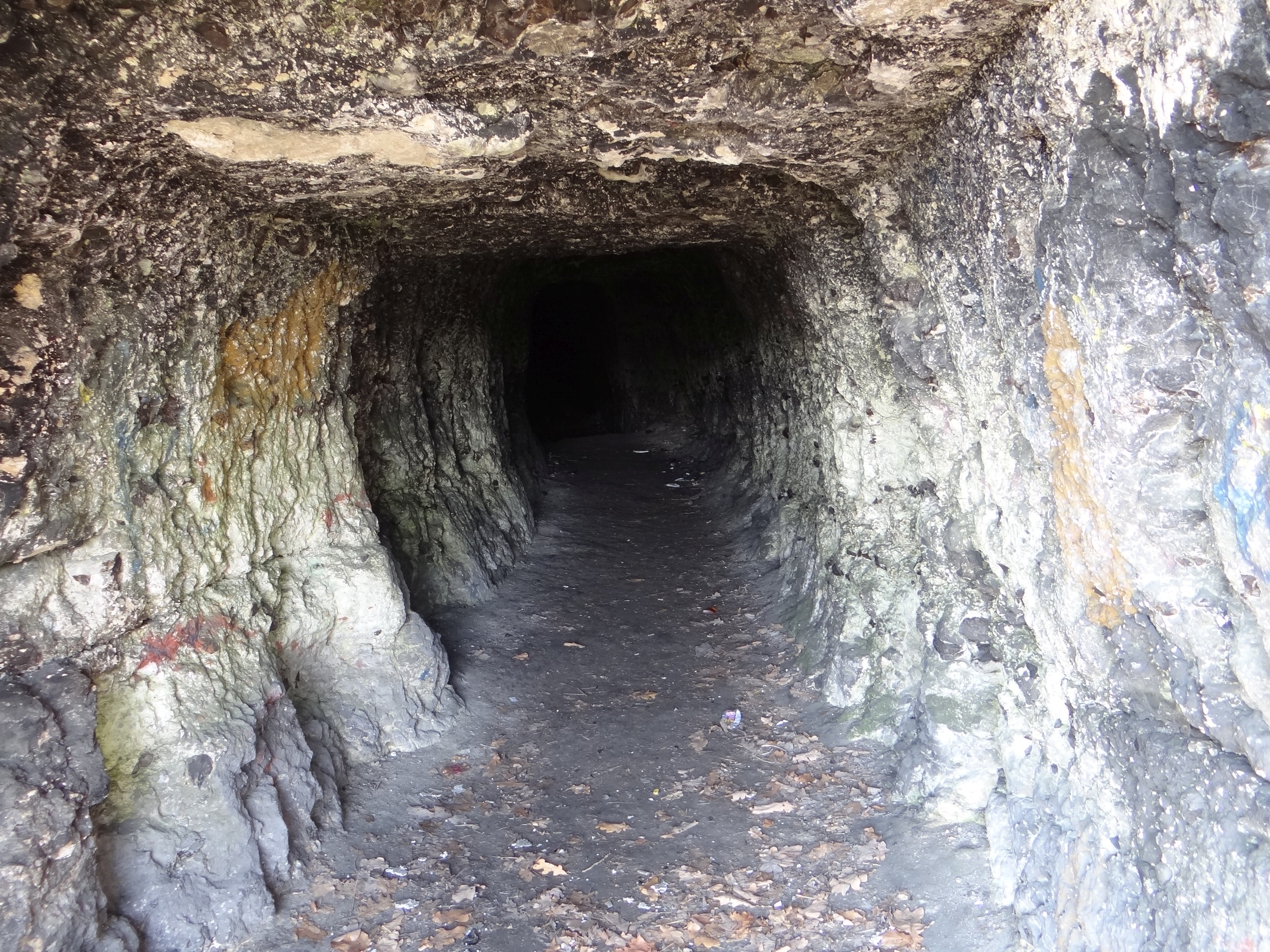 Kamieniołom w Piekarach. Sztolnia